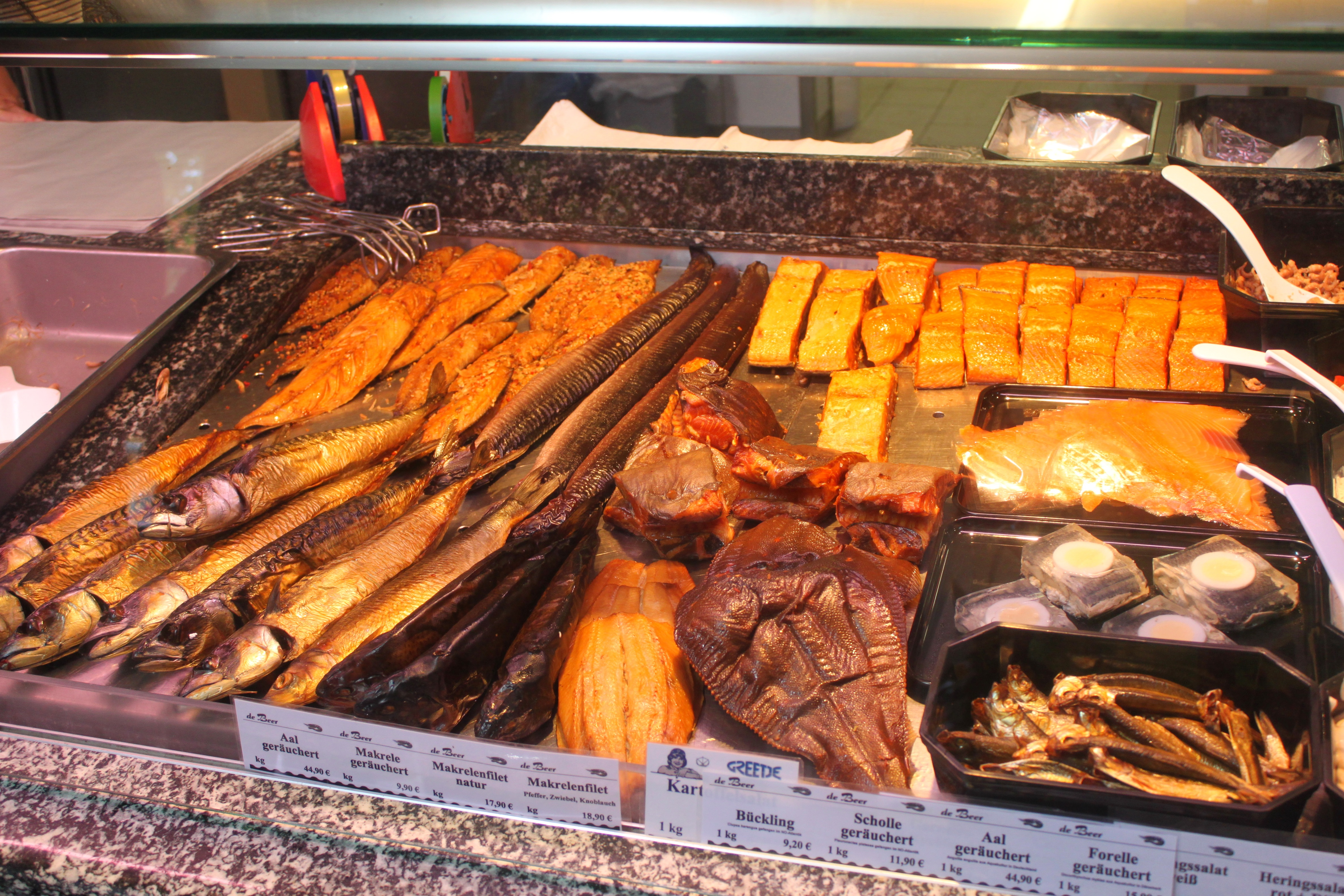 Räucherfisch in der Auslage im Fischgeschäft bei den Zwillingsmühlen in Greetsiel.